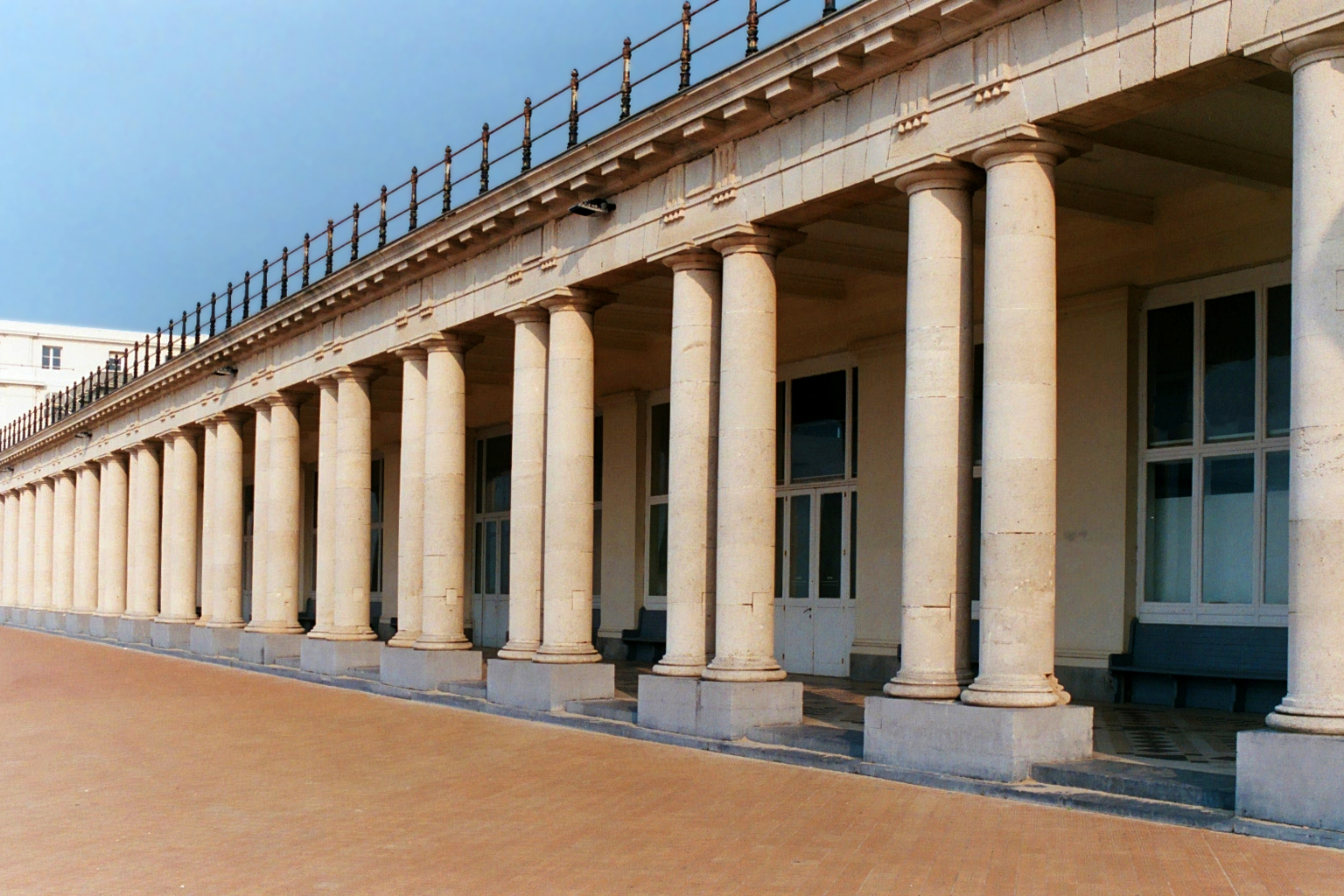 Belgique - Flandre - Galeries royales d'Ostende